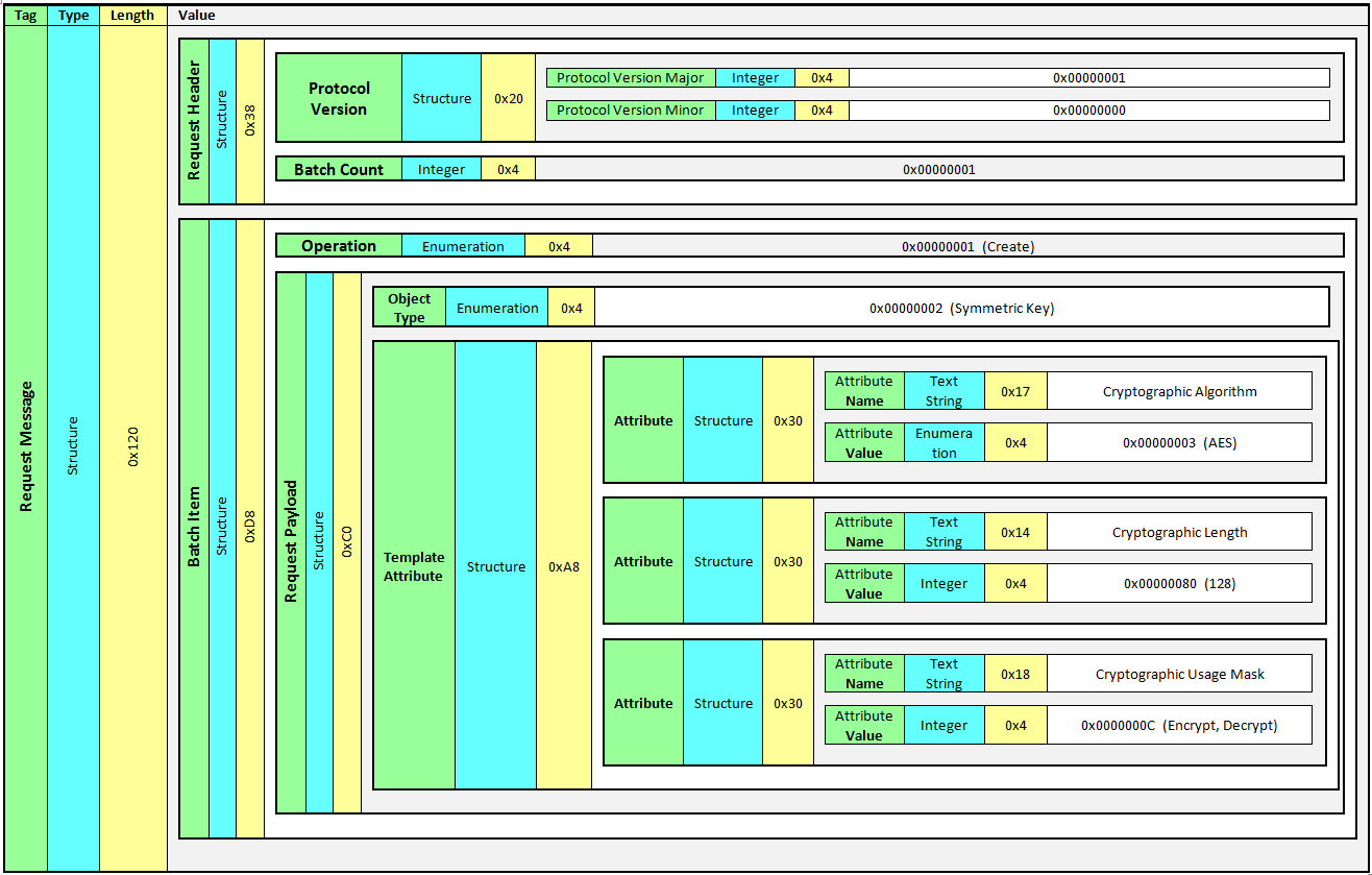 Beispiel TTLV-Codierung einer KMIP Nachricht